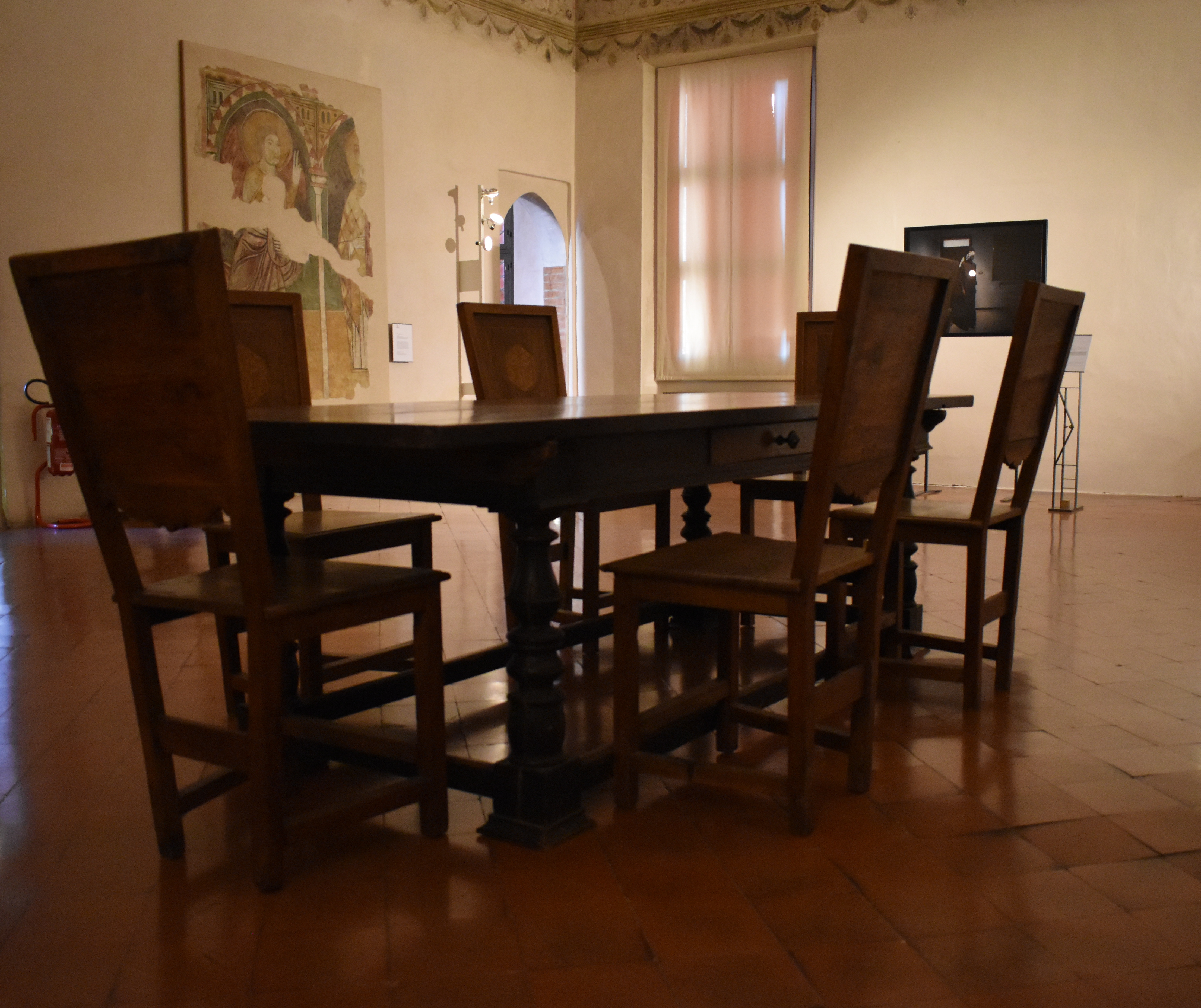 Tavolo con sedie, sala di David e Golia, Museo di Casa Romei This is a photo of a monument which is part of cultural heritage of Italy.